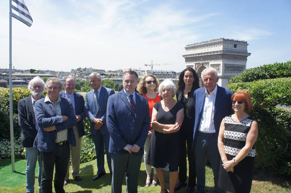 De gauche à droite : Georges-Olivier Châteaureynaud, Georges Guitton, Jean Bothorel, Vincent Bolloré, Philippe Le Guillou, Annick Cojean, Marie Sizun, Stéphanie Janicot, Patrick Poivre d'Arvor, Léna Louarn.